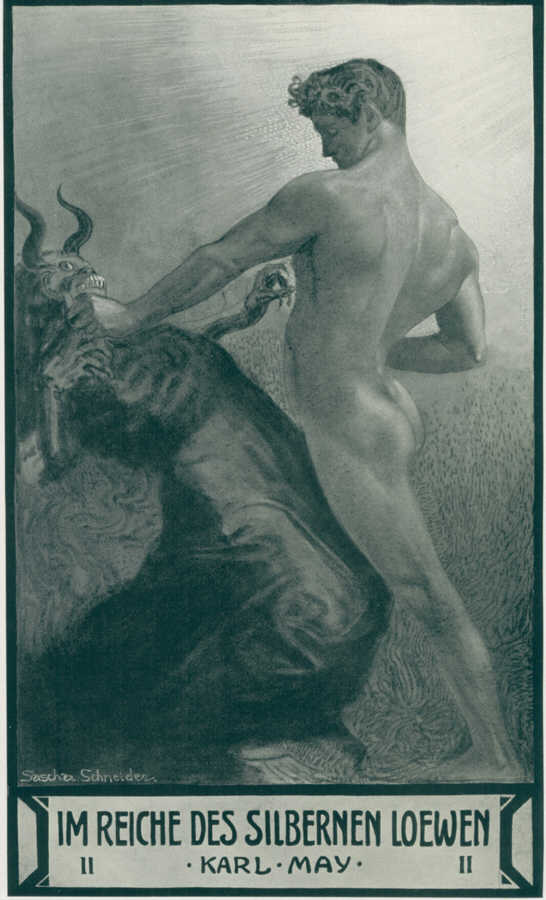 Deckelbild zu Karl Mays Reiseerzählung "Im Reiche des silbernen Loewen II" (Sascha-Schneider-Ausgabe)